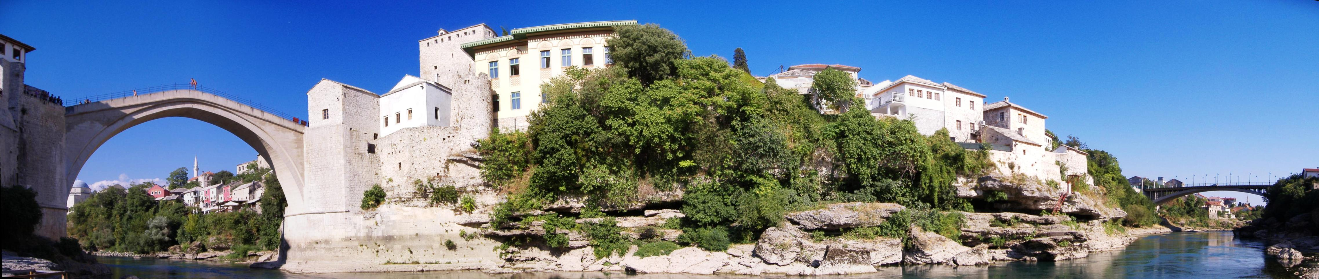 Panorama of Mostar